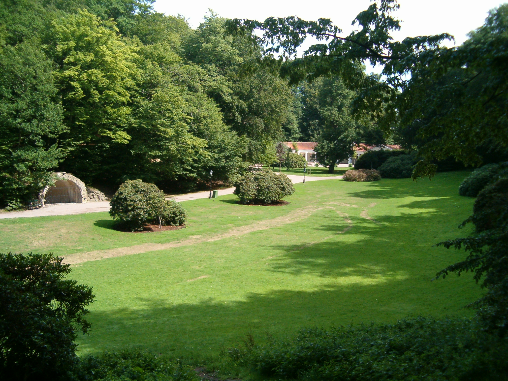 Ramlösadalen vid Ramlösa hälsobrunn i Helsingborg. Längst bort till höger i bild skymtar brunnspaviljongen, medan man till vänster ser den gamla alkalikällan.